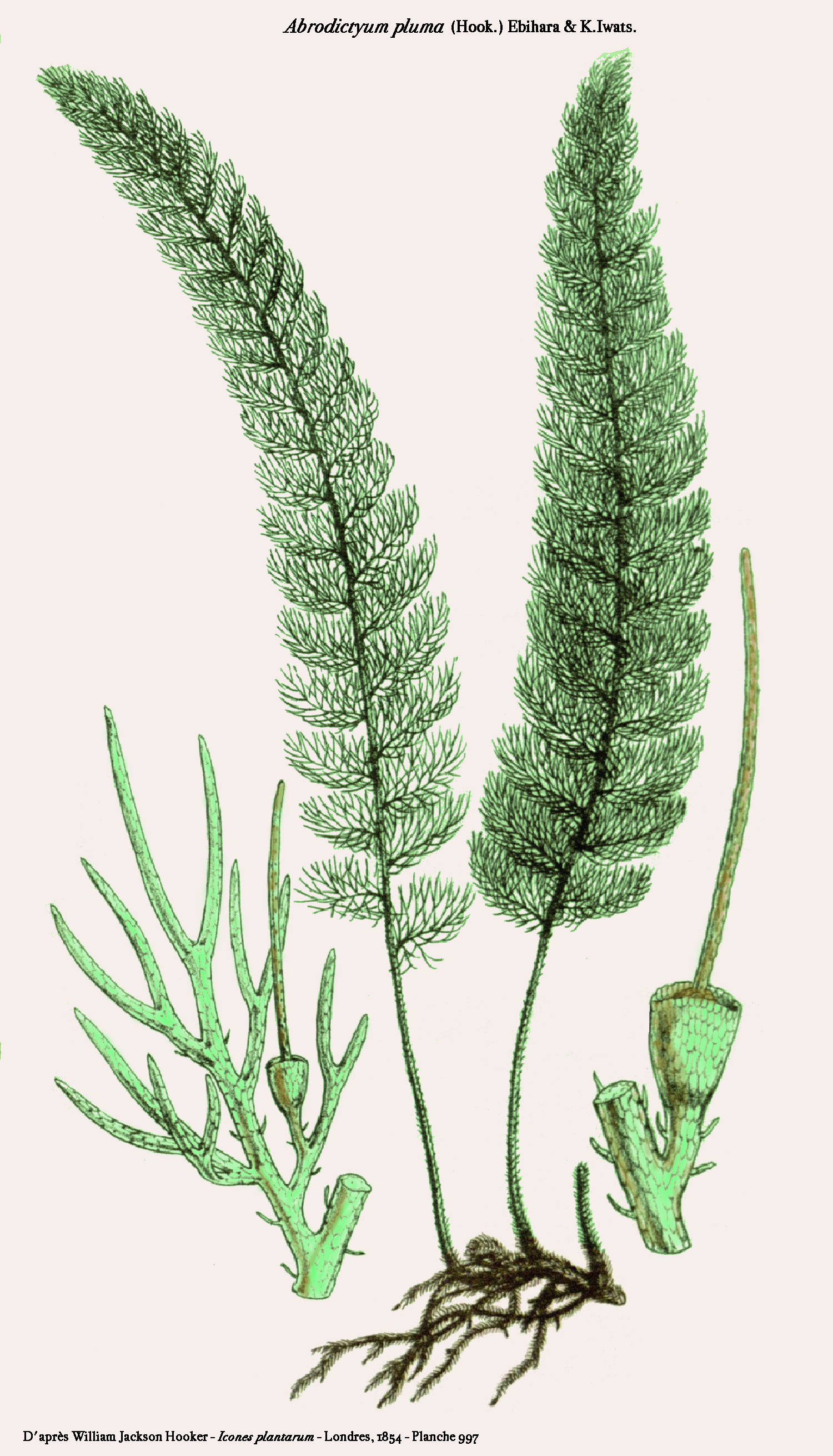 Abrodictyum pluma (publié sous le nom de Trichomanes pluma) par William Jackson Hooker dans Icones Plantarum - planche 997 - 1854. Image retravaillée par D. Prévôt